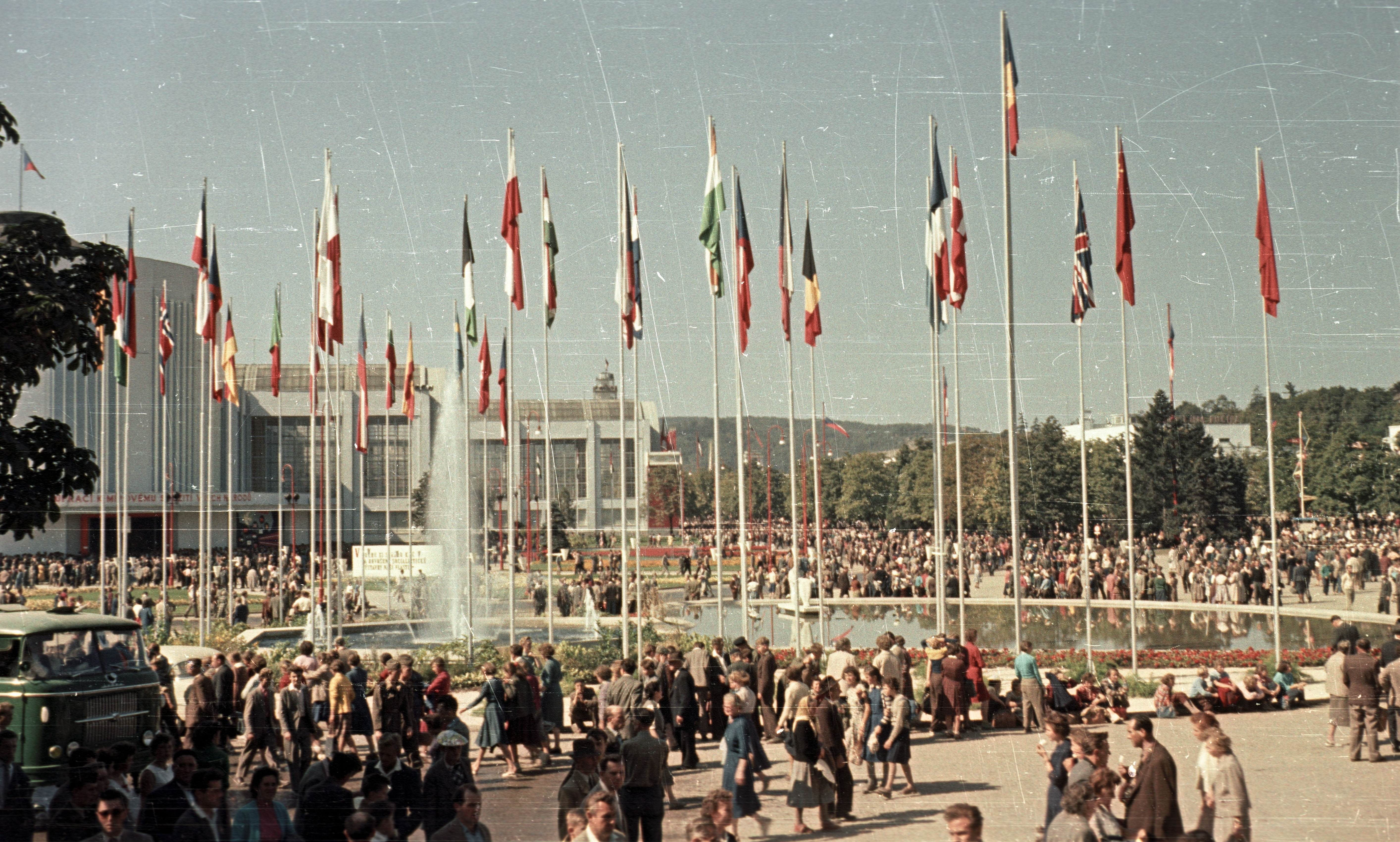 Vásárváros, Brnói Nemzetközi Vásár. Location: Czech Republik, Brno Tags: colorful, commercial vehicle, Czechoslovakia, international fair, flag pole, flag Title: Vásárváros, Brnói Nemzetközi Vásár.